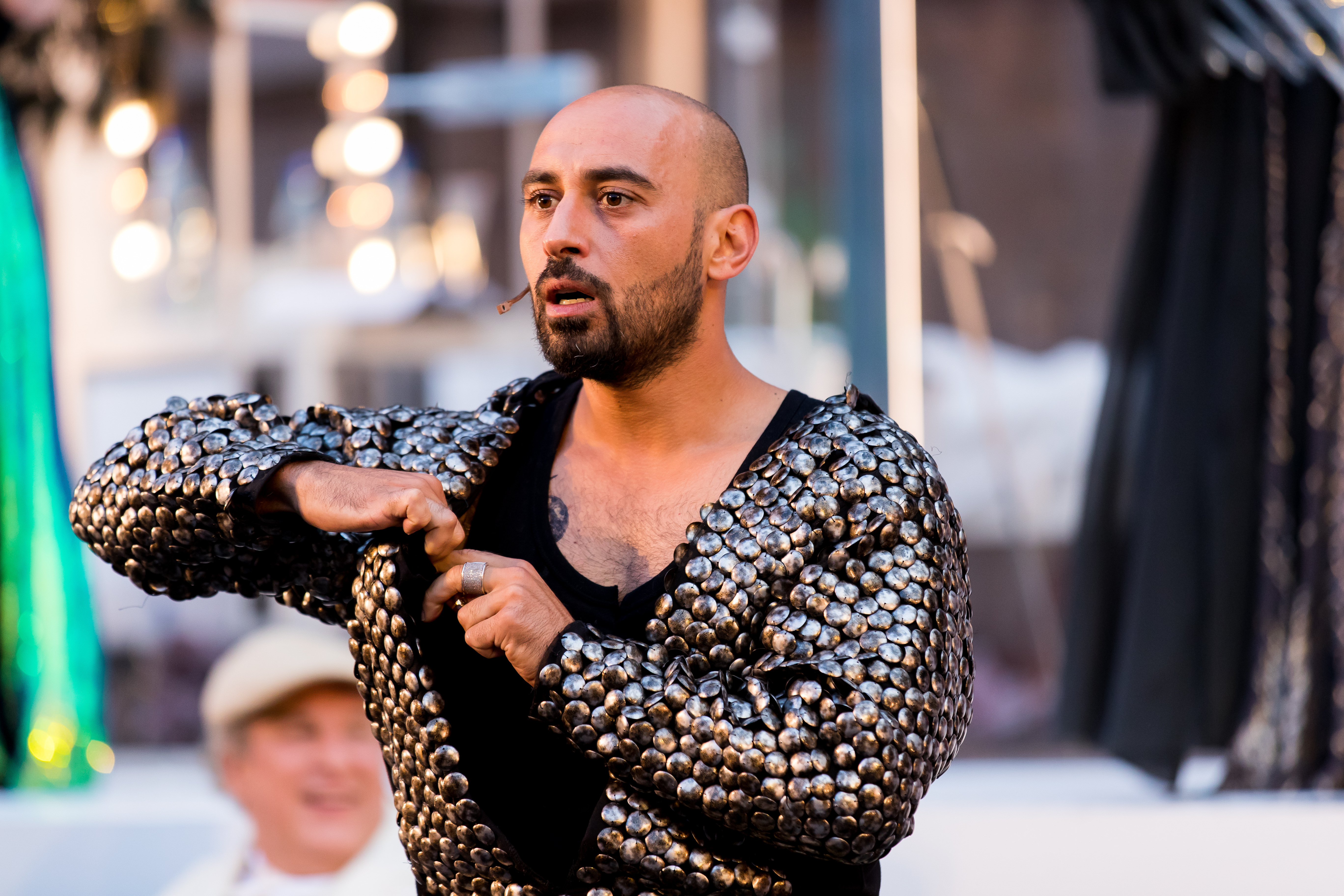 2016: Uraufführung: "GOLD. Der Film der Nibelungen" Regie: Nuran David Calis Autor: Albert Ostermaier Intendant: Nico Hofmann --- Ensemble: Produzent Konstantin Trauer: Uwe Ochsenknecht Regisseur Arsenij Kubik: Vladimir Burlakov Drehbuchautor Charlie P. Weide: Josef Ostendorf Society Reporter Peter Scheumer: Dominic Raacke Kamerafrau "the eye": Anna Rot Setdesignerin "set": Joy Maria Bai Assistentin des Produzenten Carmen: Alexandra Kamp Maskenbildnerin Sueyla Blume : Ayse Bosse die Ältere Kriemhild Karina Bergmann: Katja Weitzenböck die Jüngere Kriemhild Simone Gehel: Constanze Wächter die Ältere Brünhild Lotte Jünger: Michaela Steiger die Jüngere Brünhild Nathalie Aurun: Dennenesch Zoudé Siegfried Mohamad Söder: Ismail Deniz Hagen René Inner: Sascha Göpel Gunther Klaus Castel: Maximilian Laprell Bürgermeister Franz Koppoler: Heiner Lauterbach during Nibelungenfestspiele "GOLD. Der Film der Nibelungen" at Wormser Kaiserdom, Worms, Rheinland Pfalz, Germany on 2016-07-12, Photo: Sven Mandel